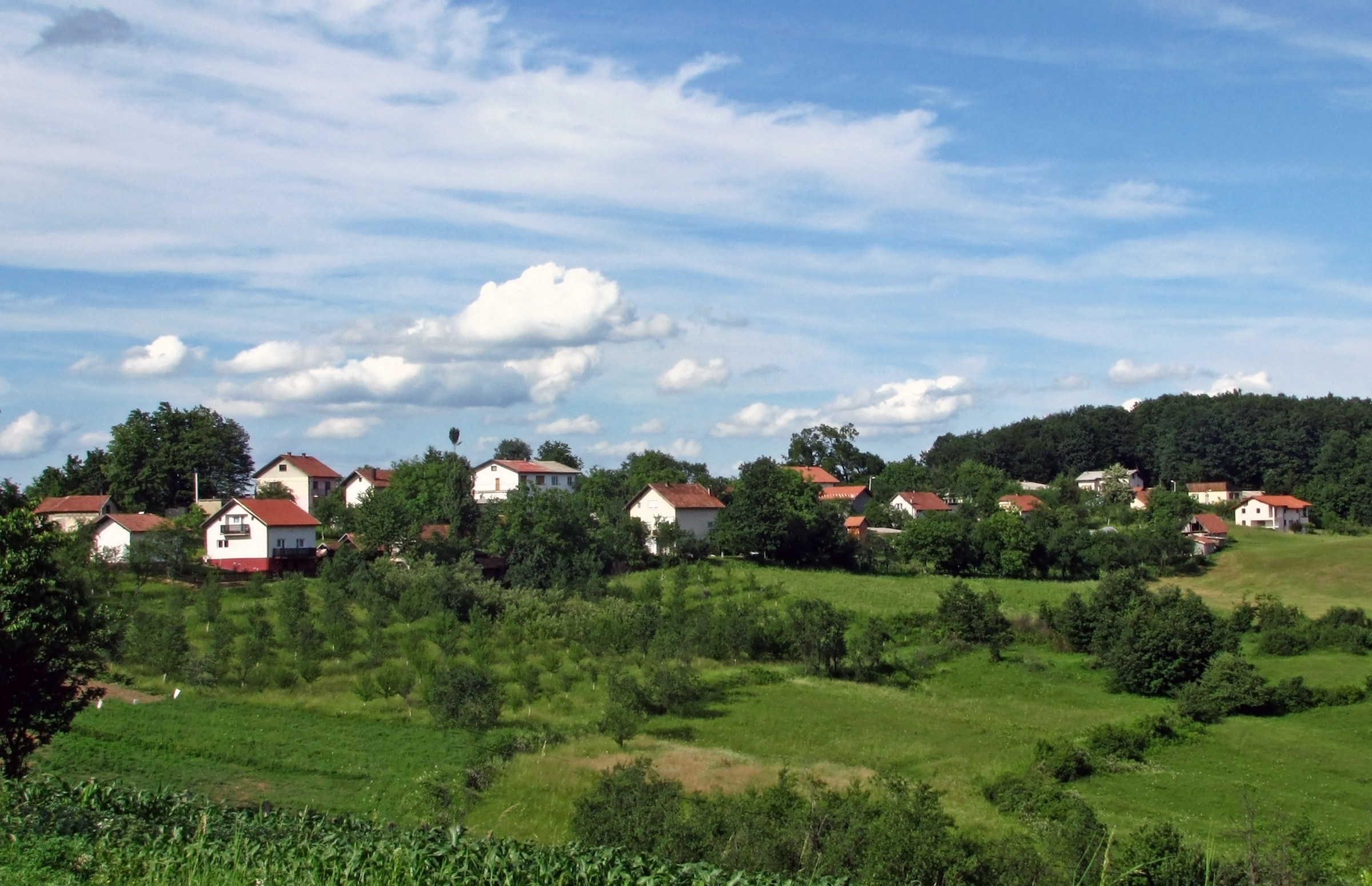 Укриница